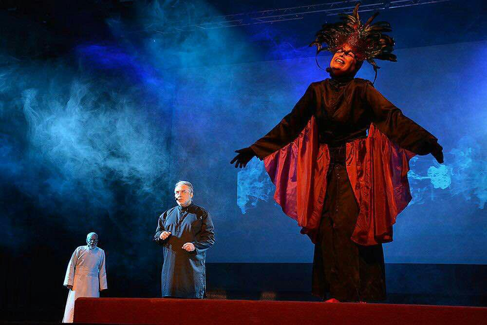 نمایی از نمایش بر فرس تندرو